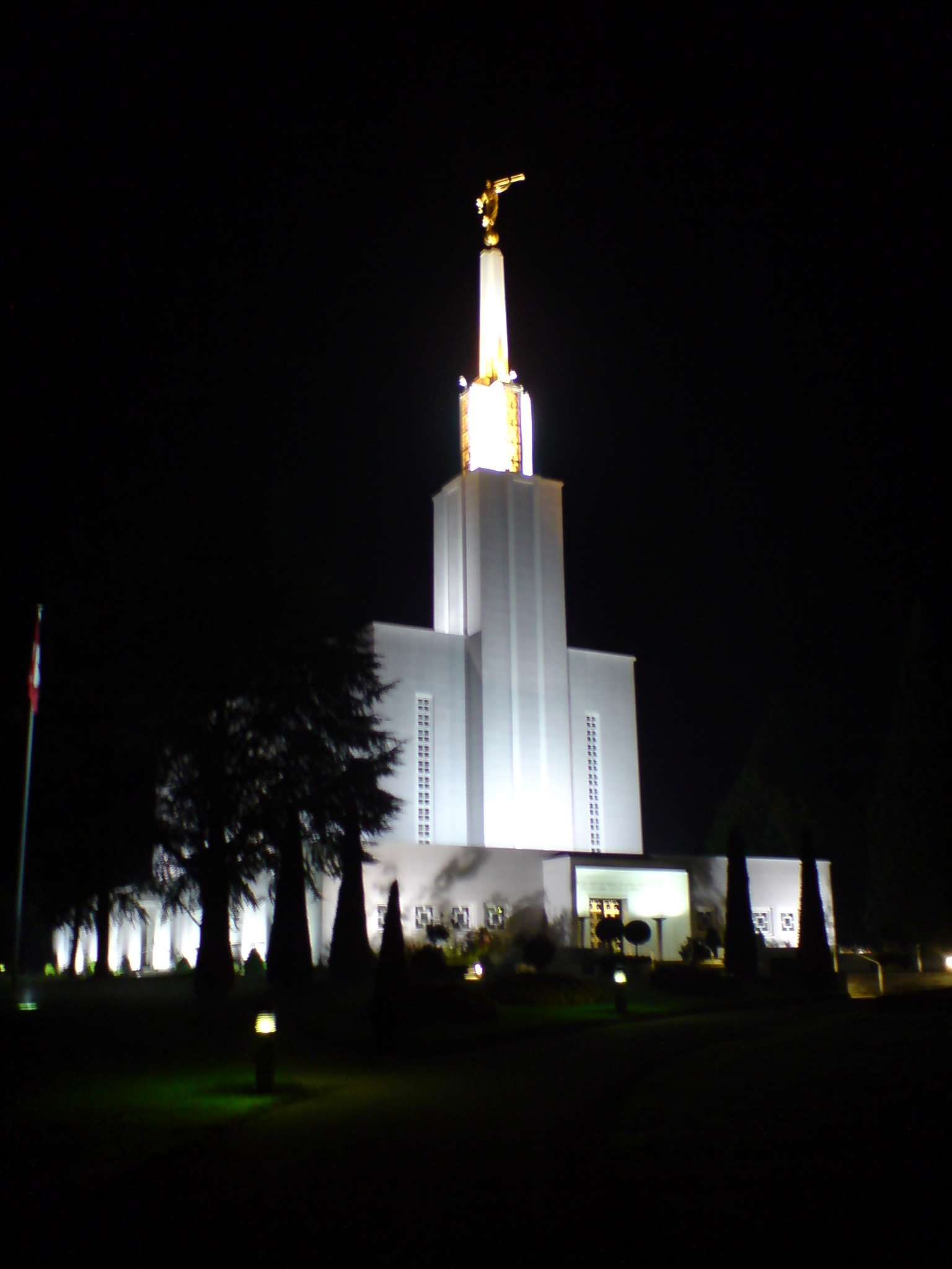 Mormonen-Tempel bei Nacht mit der neuen Statue des Engels Moroni